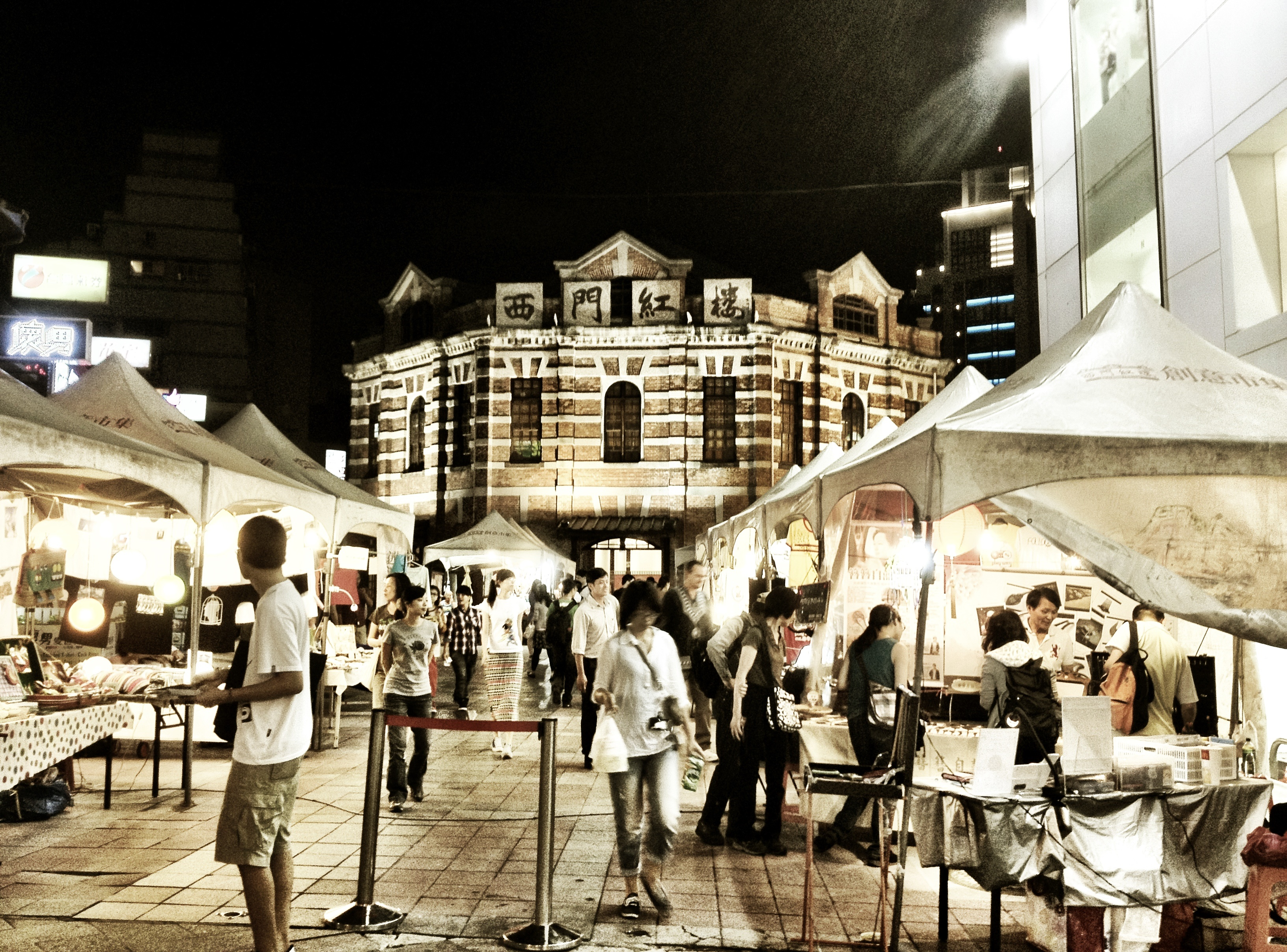 臺北市西門紅樓創意市集夜景。